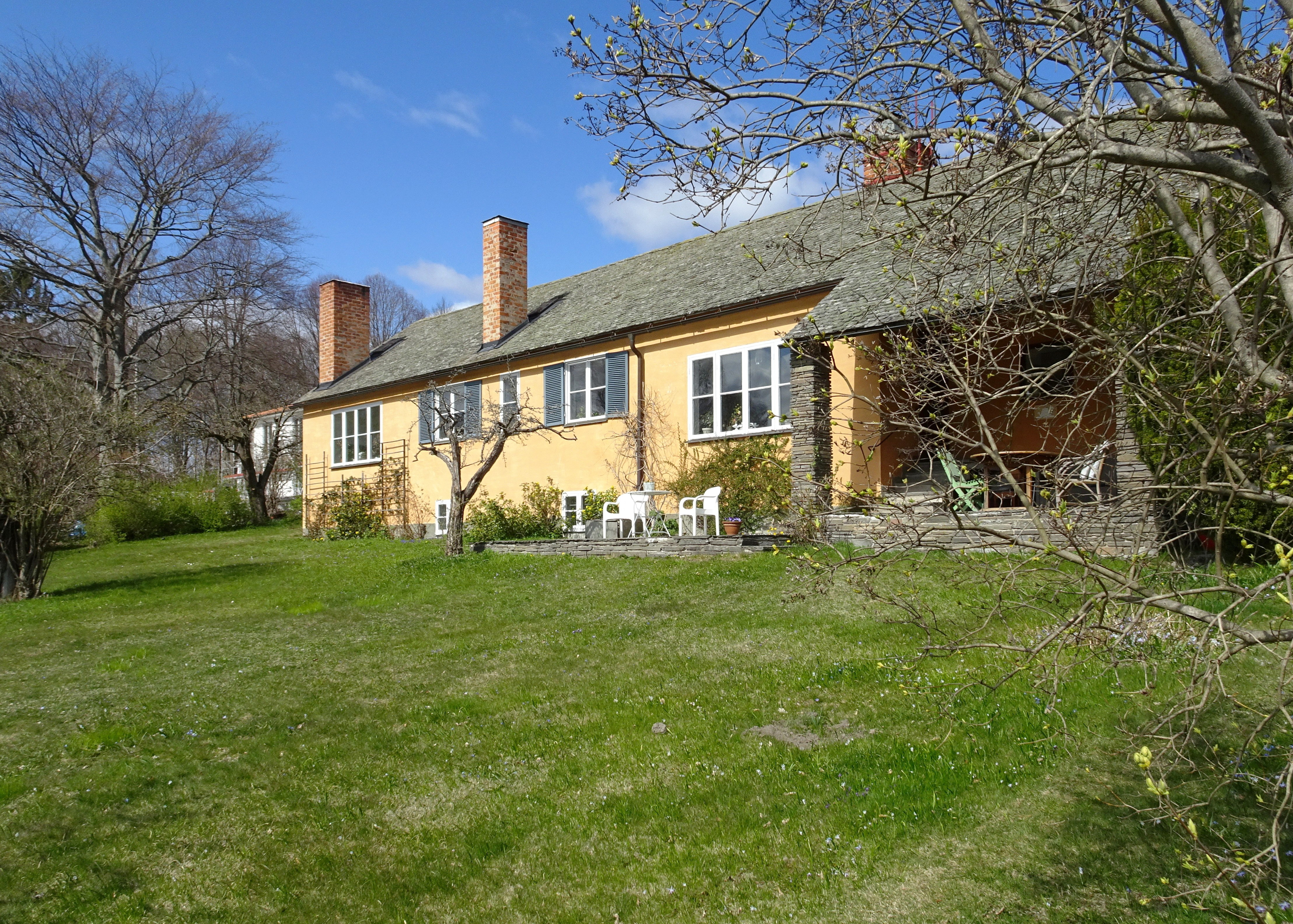 Sven Ivar Linds egen villa vid Kevinge strand 27 i , Danderyd, byggår 1945-1946.